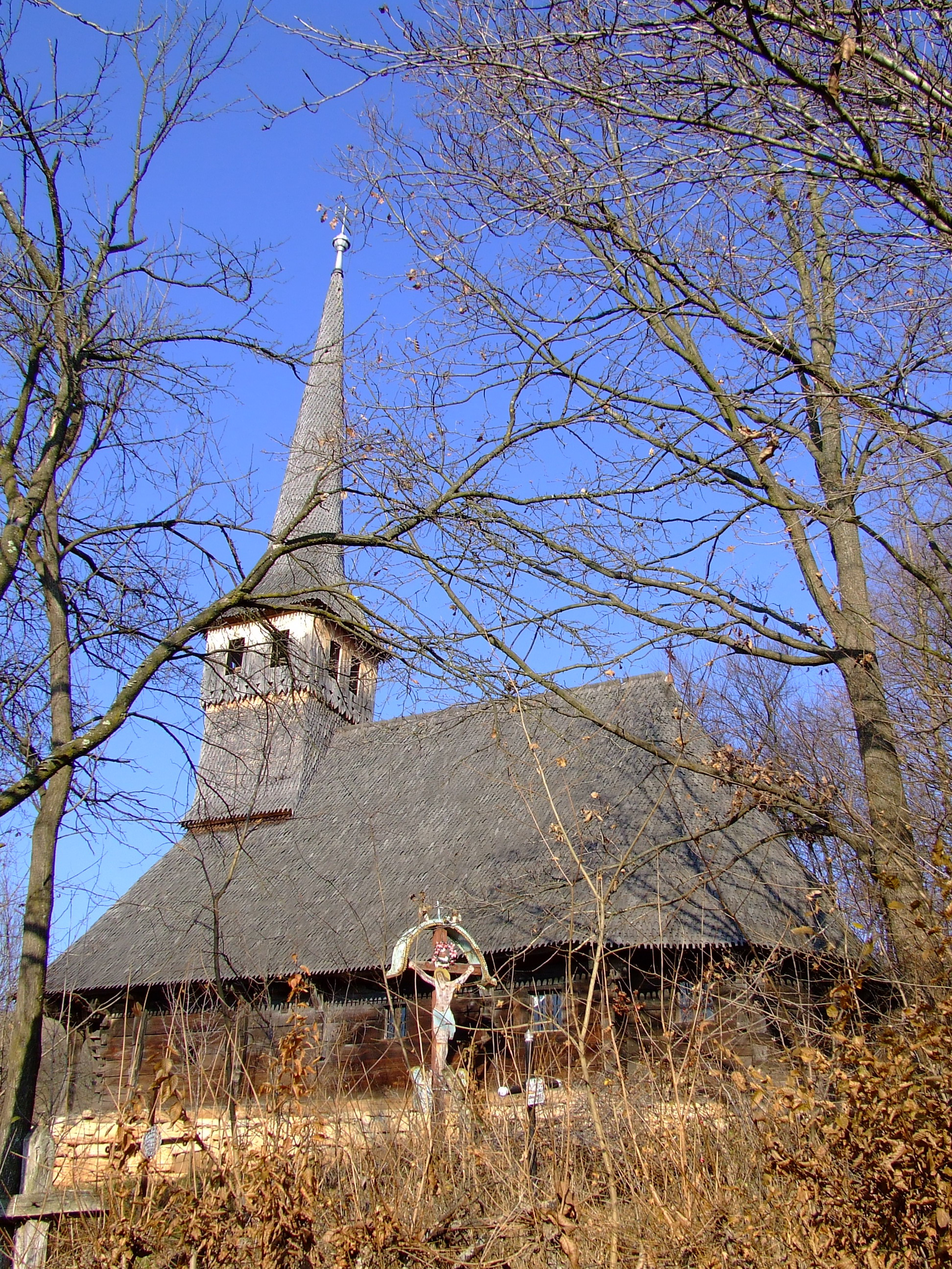 Biserica de lemn din Inău, judeţul Sălaj. Autor: Bogdan Ilieş Data: aprilie 2006